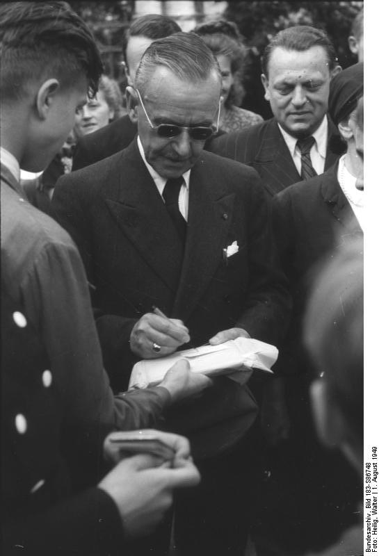 ADN-ZB /Illus - Heilig Thomas Mann in Weimar 1949 Thomas Mann gibt Autogramme. 3667-49, 1.8.49